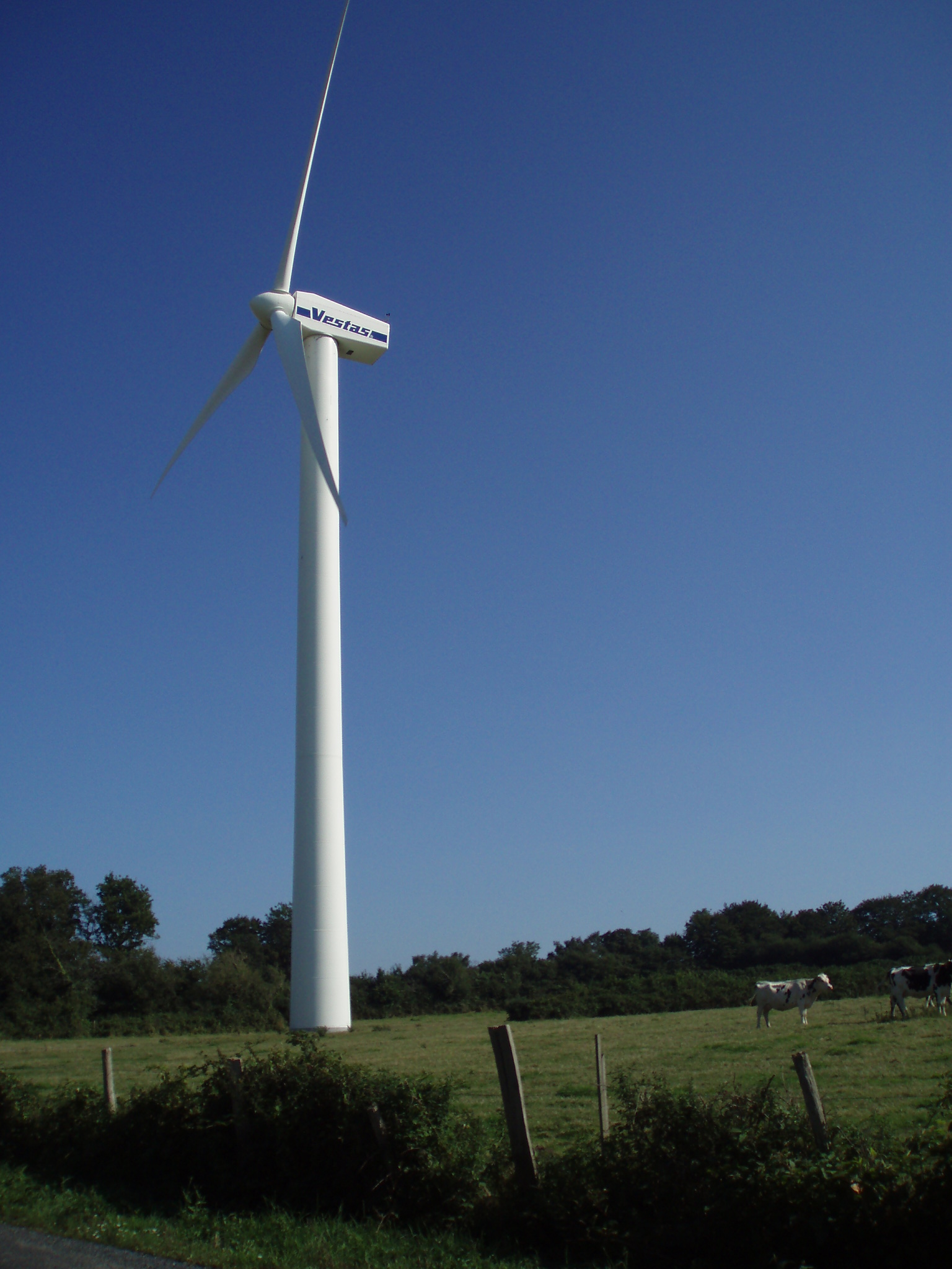 Une des Éolienne pres de Clitourps (Manche)